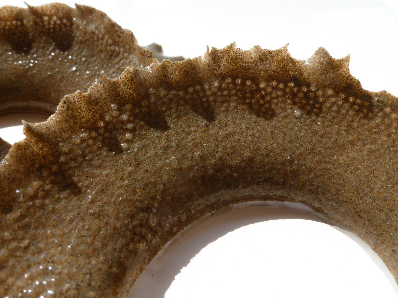 „Sandkragen“ (Eigelege) einer Mondschnecke (Familie Naticidae), Strandfund, Nordostspanien, Mai 2013, Breite ca. 3 cm, Durchmesser ca. 10 cm